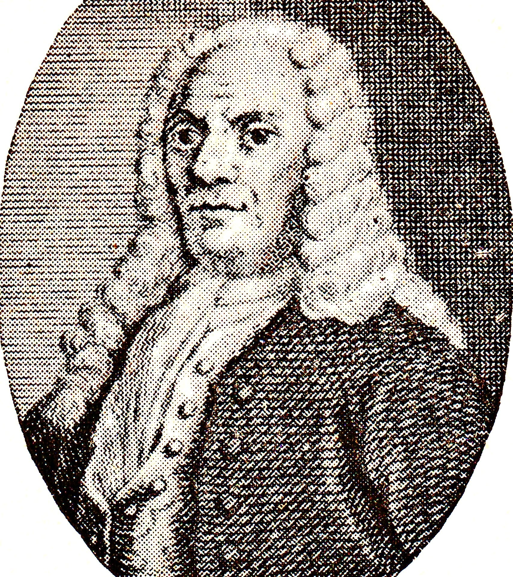 Abraham Patras